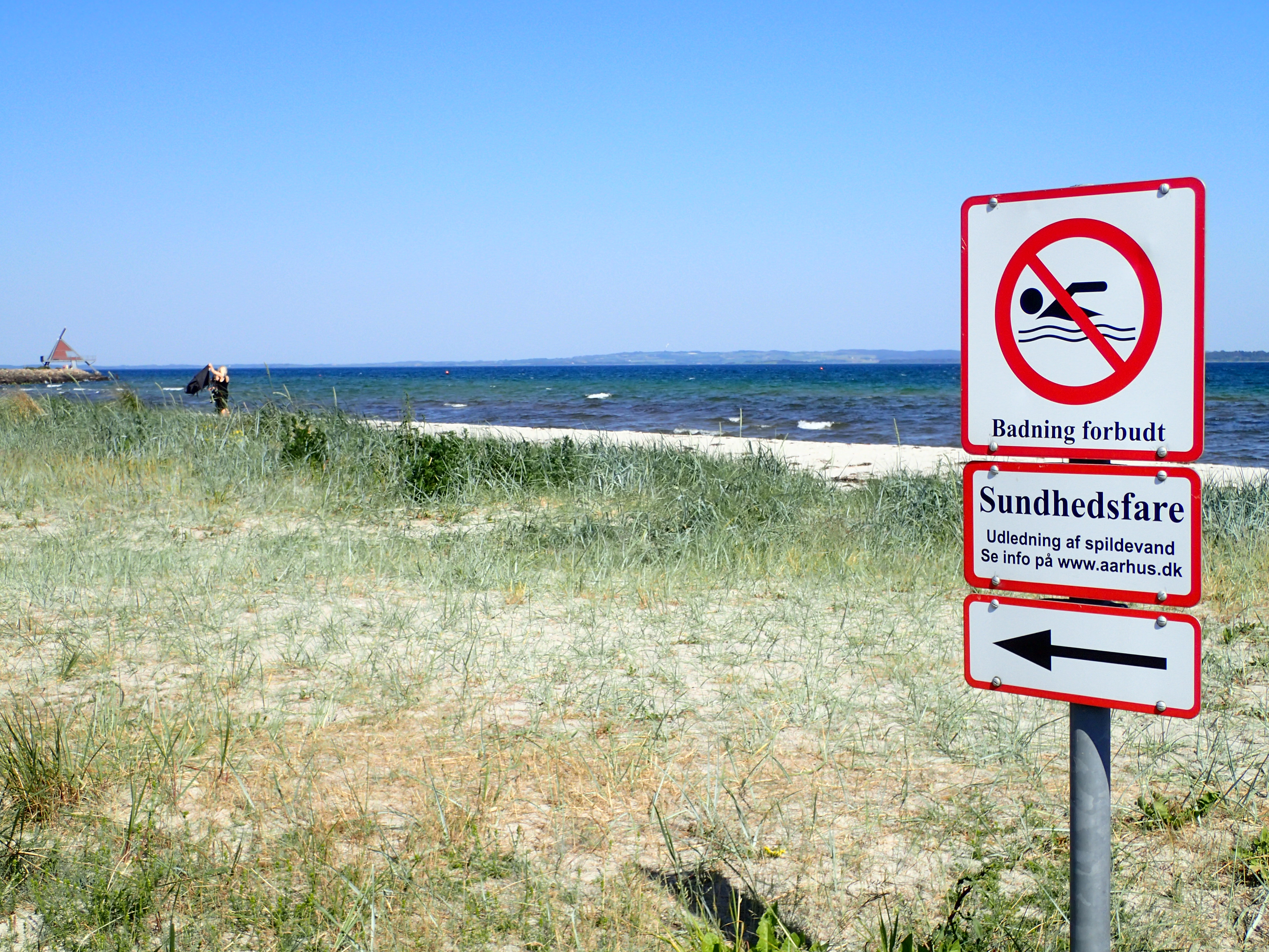 Åkrogen. Der er permanent badning forbudt ved Egåens udløb og et par hundrede meter syd herfor.